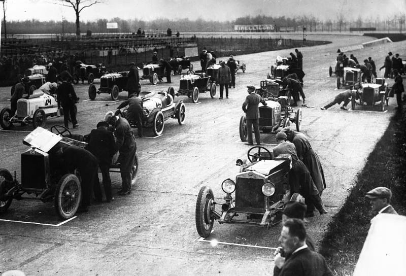 Monza / Mailand. Trainingsfahren um den Preis "Rund um Mailand" auf der grossen Automobilstraße in Monza. Die italienische Automobil-Industrie ist gegenwärtig in grossem Training um den Preis "Rund um Mailand". Blick auf den Startplatz aauf der Rennbahn in Monza. Information added by Wikimedia users.*